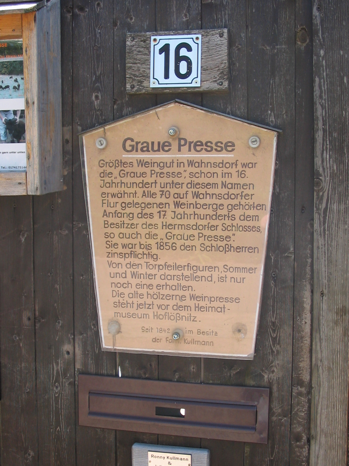 Eingangssituation Graue-Presse-Weg